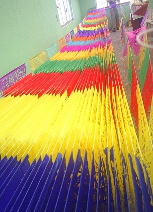 Método empleado para pegar las banderas de papel de china picadas en tiras de hilo de algodón.